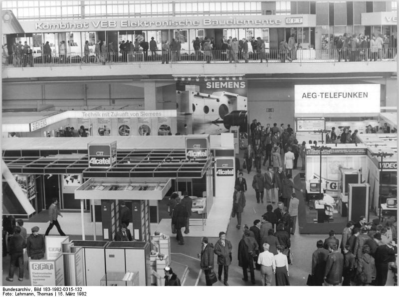 Leipzig, Frühjahrsmesse, AEG Telefunken ADN-ZB Lehmann 15-3-82 Leipzig-Herbstmesse 82- 9.000 Aussteller aus über 60 Ländern sind auf der diesjährigen Leipziger Frühjahrsmesse vertreten. Auch das renomierte Unternehmen AEG Telefunken aus der BRD stellt aus.